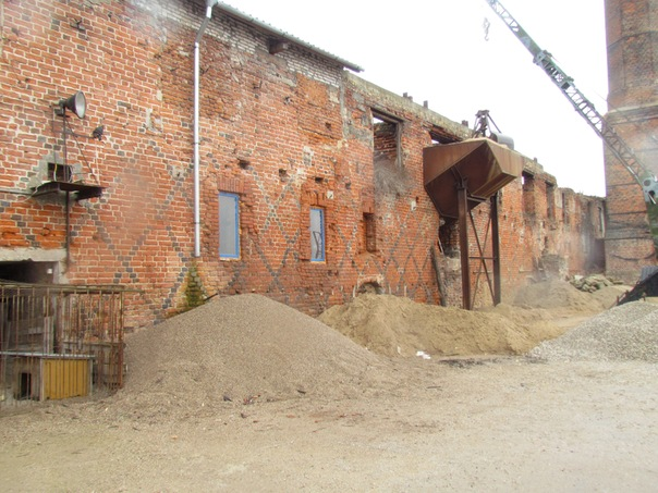 Замок Тильзит